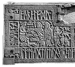 Runenkästchen von Auzon (um 650), vordere Tafel Dargestellt: Wielands Rache